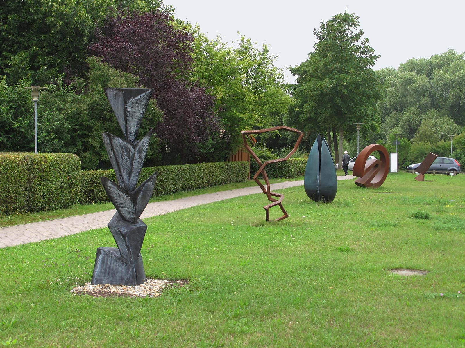 Fünf Skulpturen des "Skulpturenwegs Maulbronn" - Deutschland, Baden-Württemberg, Maulbronn, in der Talaue der Salzach